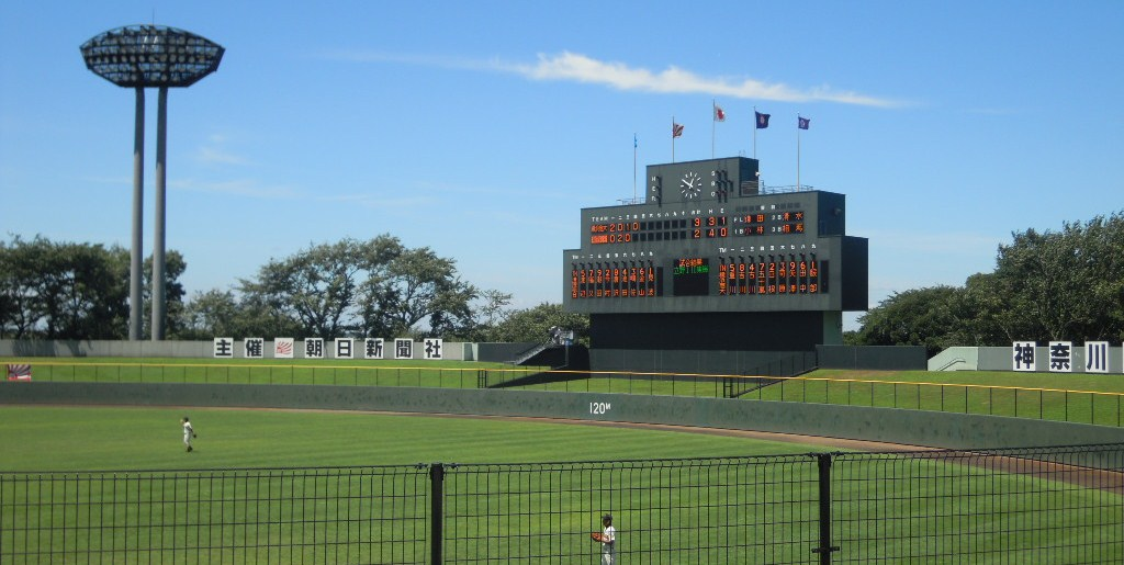 保土ヶ谷球場スコアボード 2010年7月18日 投稿者撮影